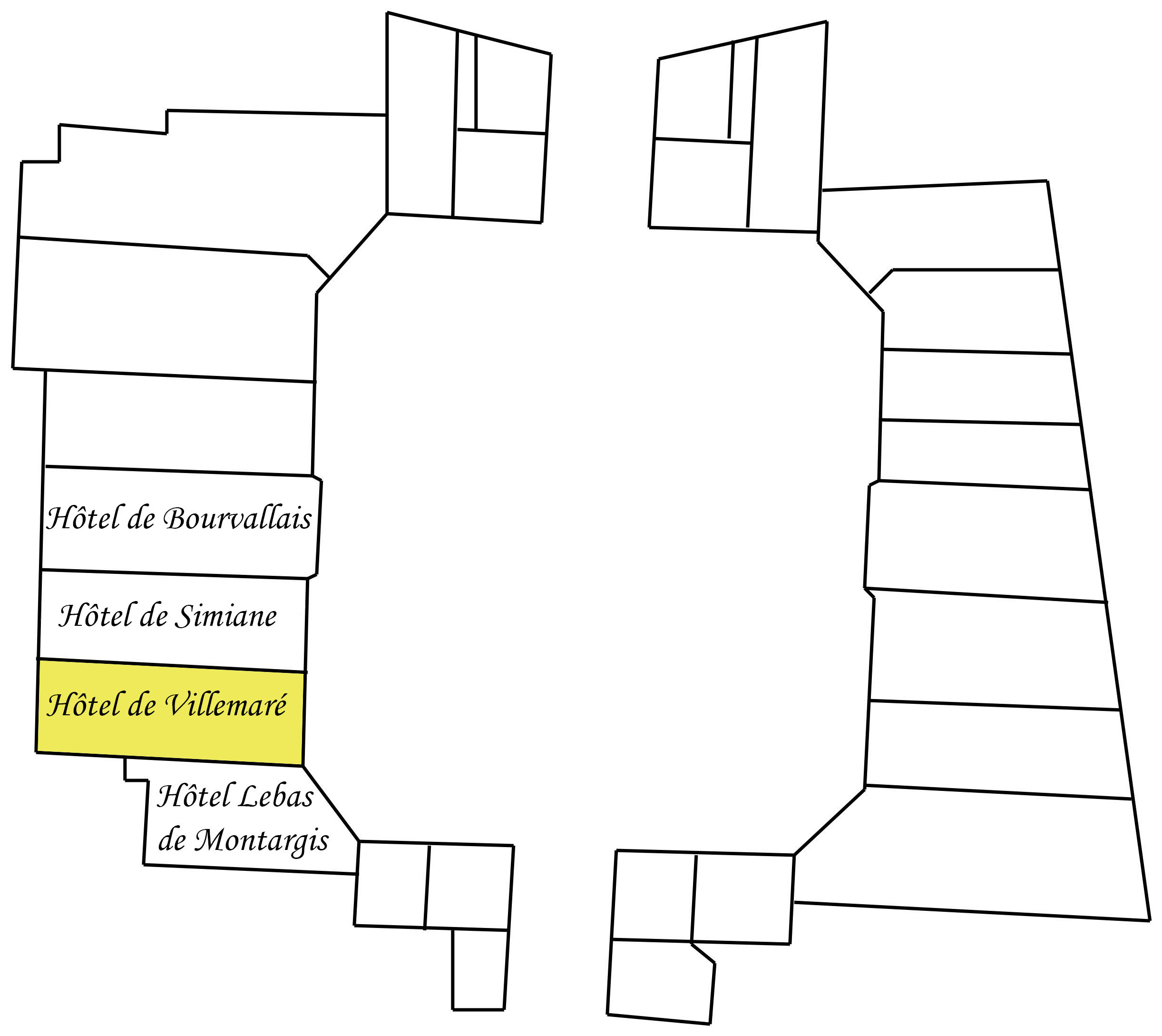 Mise en valeur de l'hôtel de Villemaré sur la place Vendôme